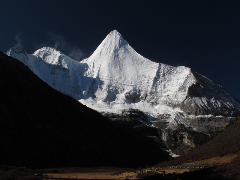 央迈勇雪山，中国四川稻城亚丁。摄影雷淼，2011年10月24日。